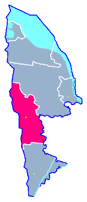 Locator maps for communes in województwo zachodniopomorskie : Dobra (zpl) gm.png (podział na gminy)